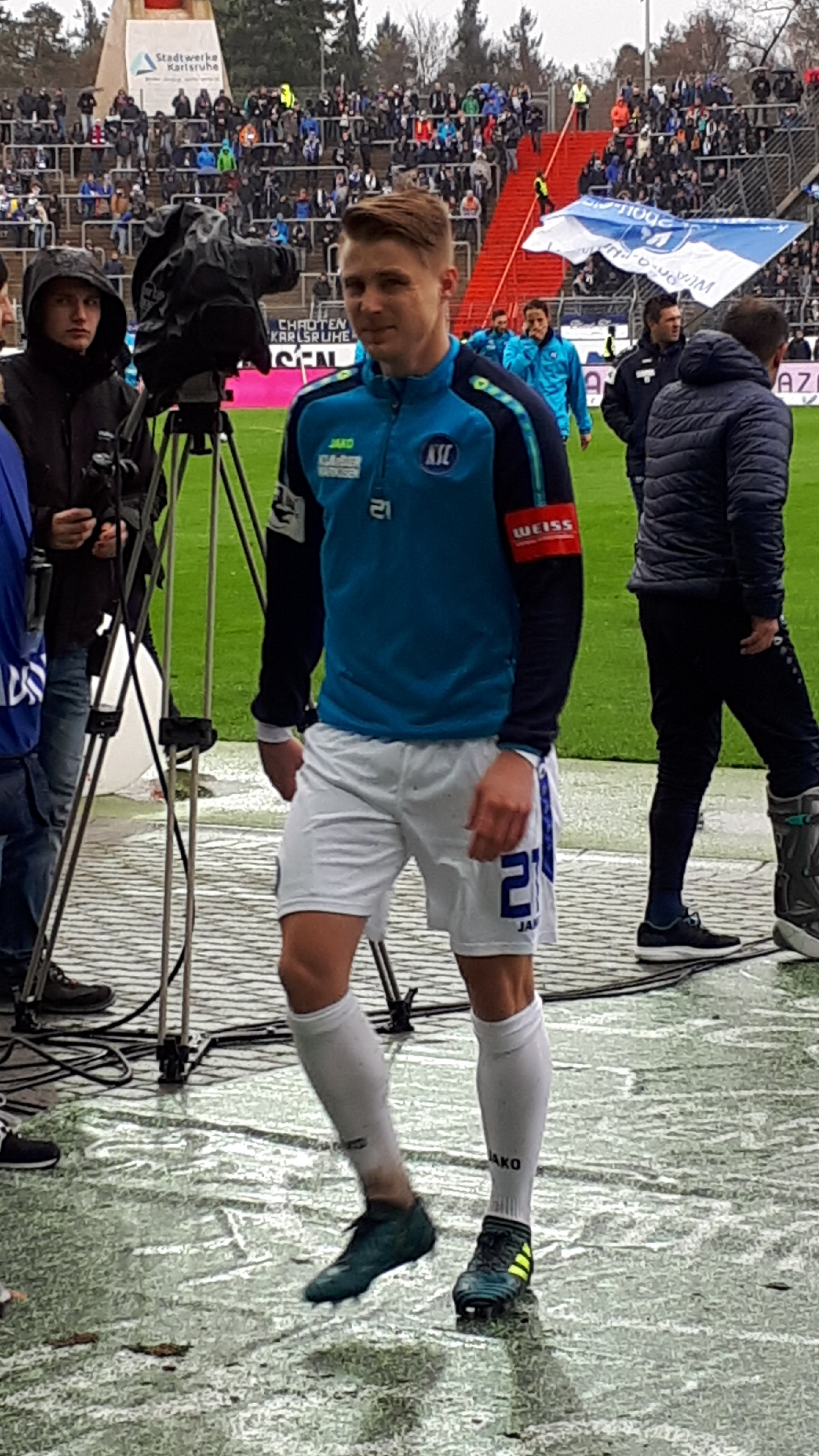 Fußballspieler Marco Thiede beim Heimspiel des Karlsruher SC gegen die SpVgg Unterhaching am 20. Januar 2018.